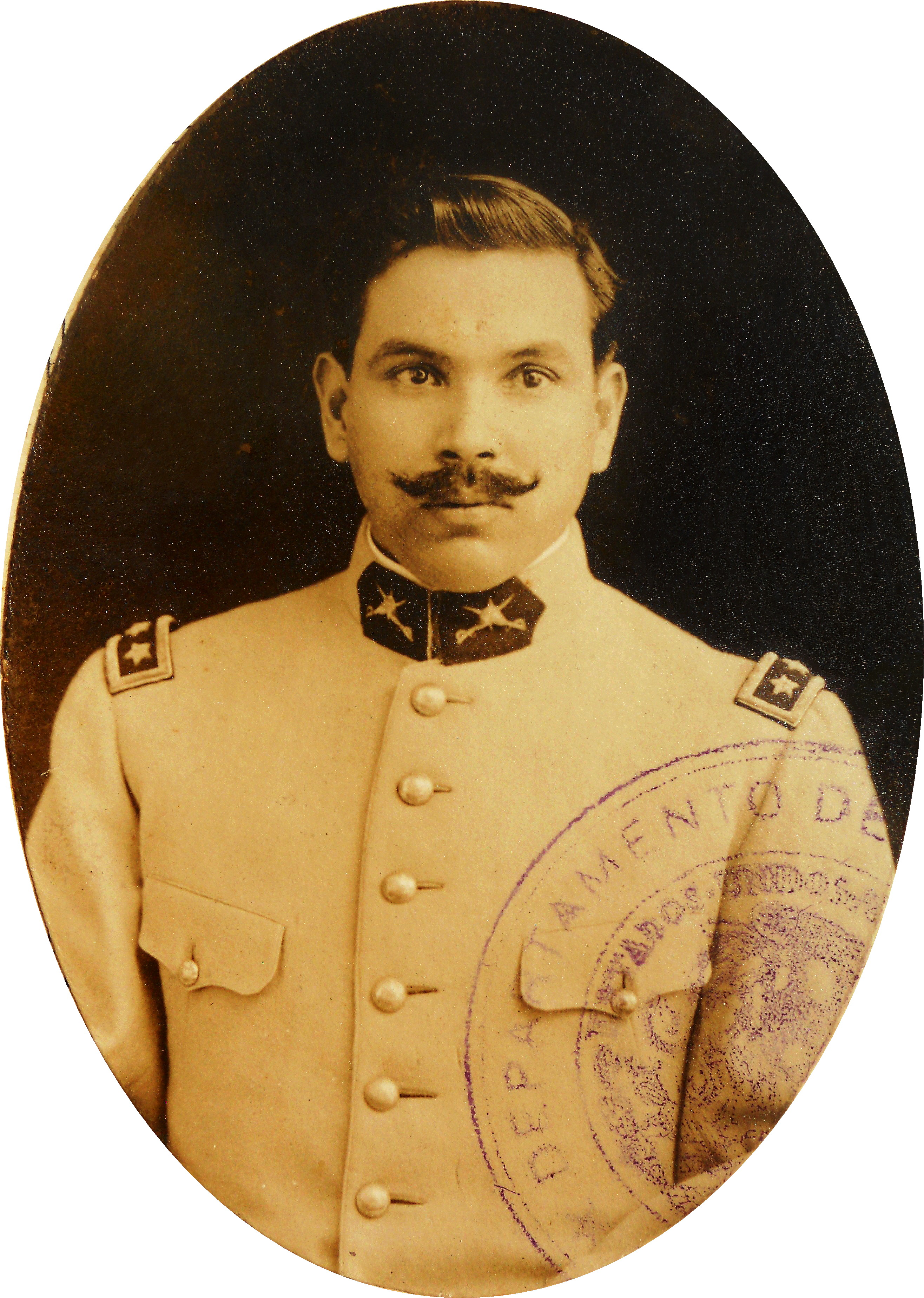 Foto del Coronel de Caballería Eladio Castro Álvarez en 1916 (archivo personal de su hija Alicia Castro Sánchez)